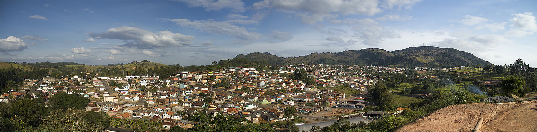 Vista geral do Centro de Caldas. Ao Fundo a Pedra do Coração (direita) e Pedra Branca (Esquerda)